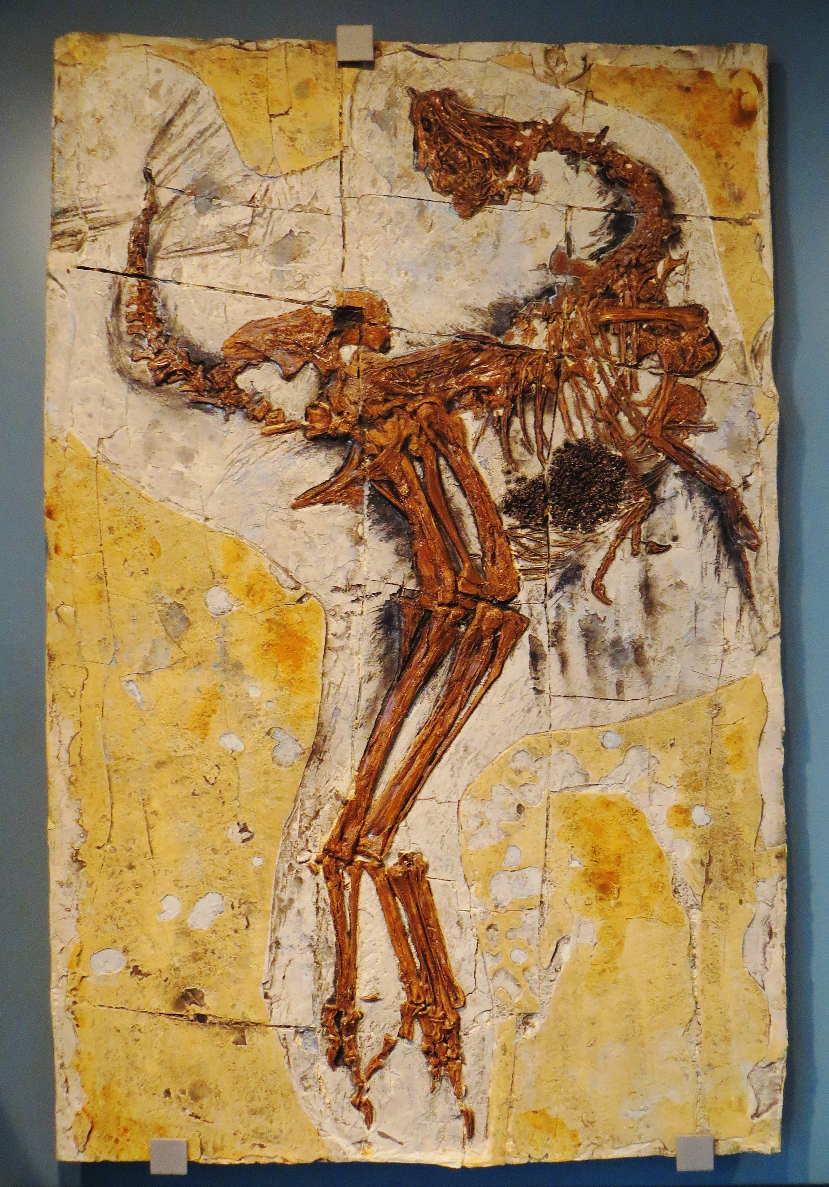 Took the picture at Jura-Museum, Eichstaett